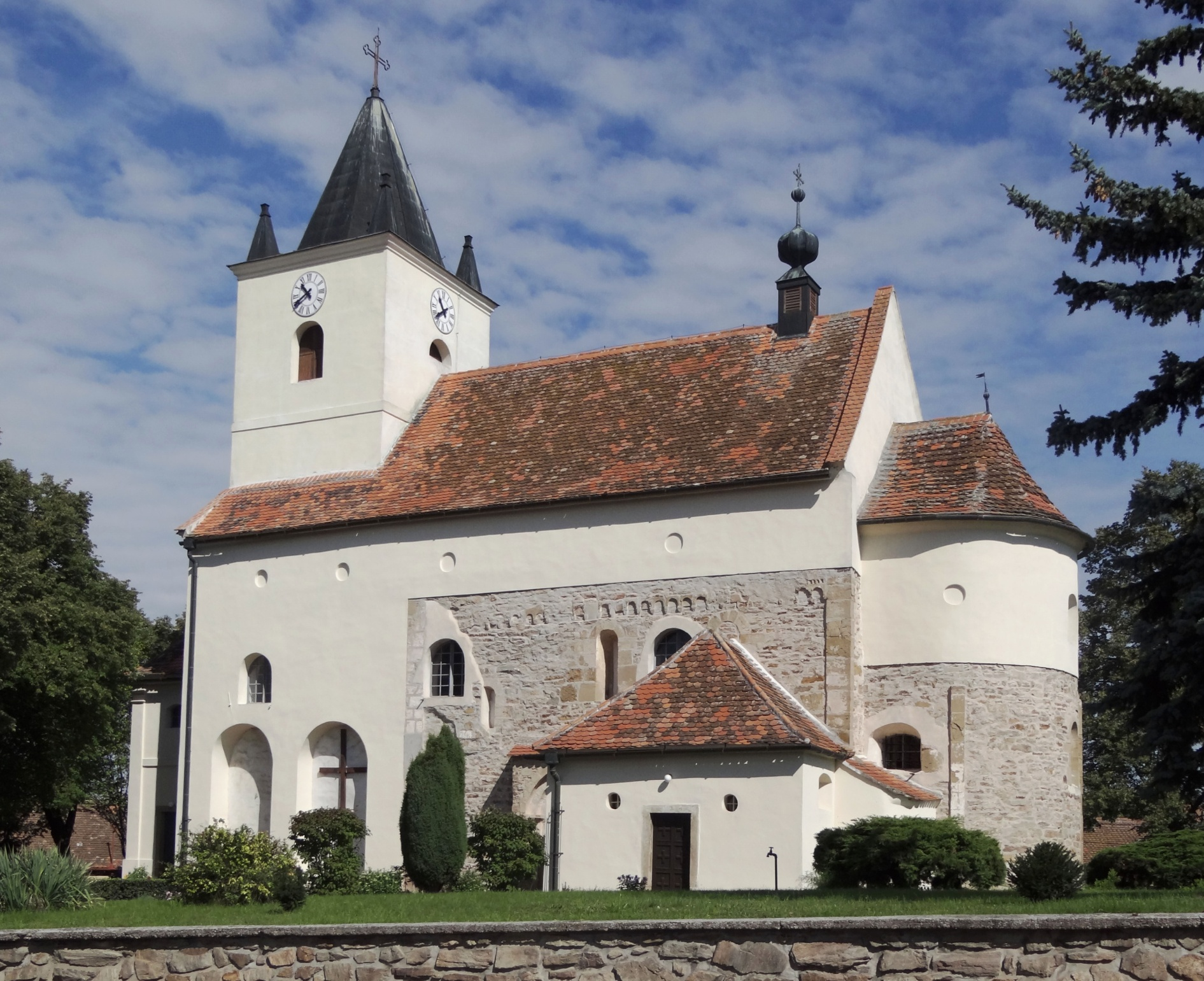 Kostel svatých Petra a Pavla, v centru obce, Mikulovice (okres Znojmo).